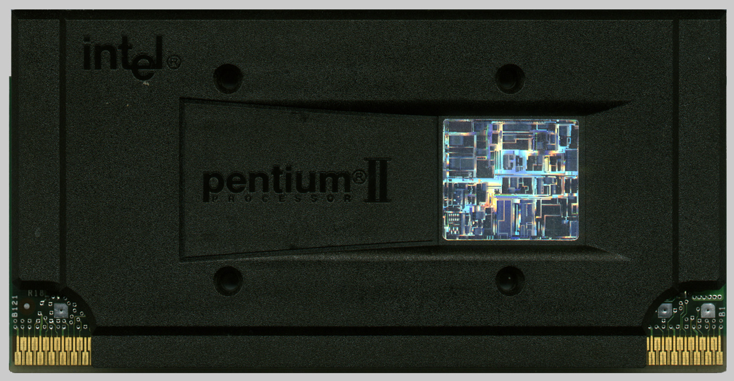 Pentium II 350 MHz (Deschutes @ SECC2) SL356